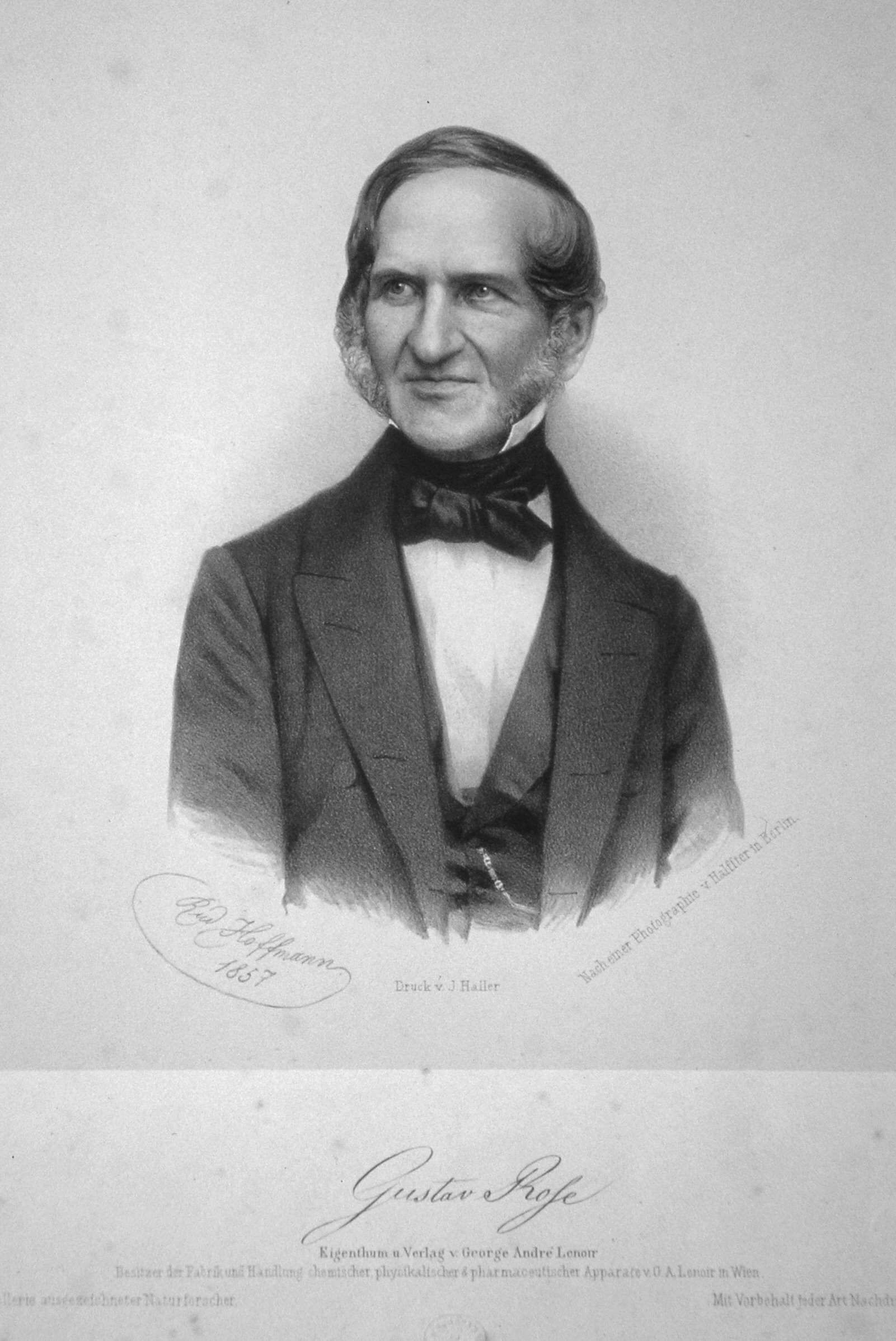 Gustav Rose (Mineraloge),Lithographie nach einer Fotografie von Halffter (Berlin) von Rudolf Hoffmann, 1857